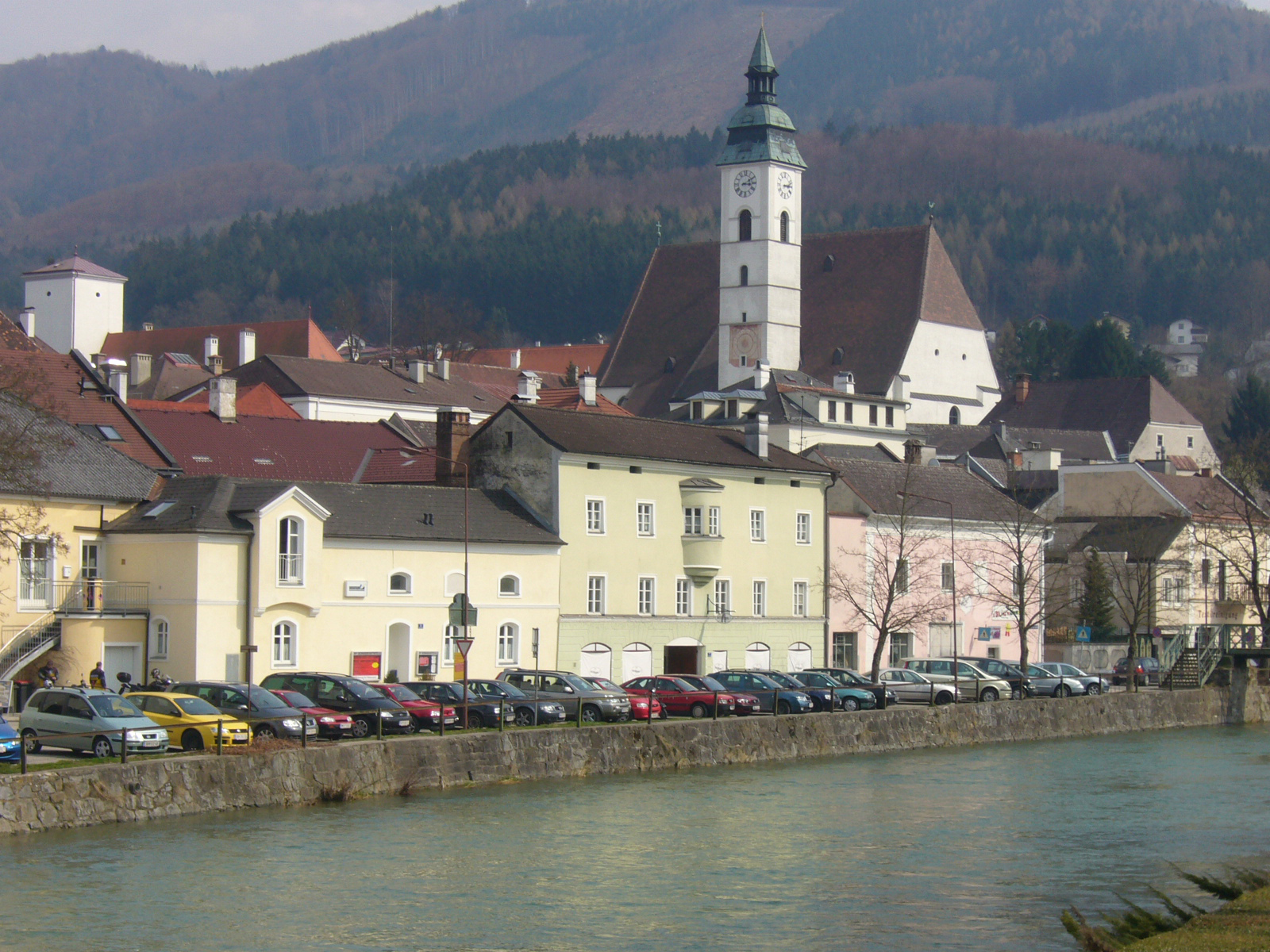 Blick gegen Scheibbs